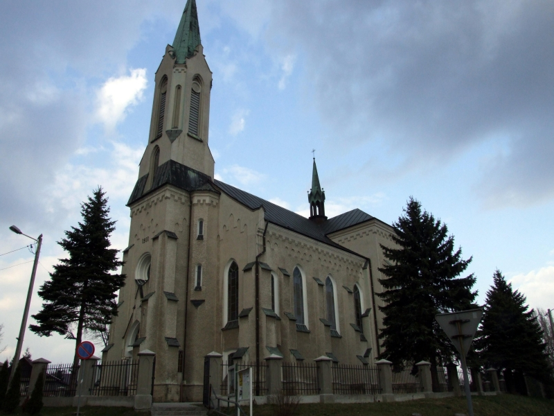 Kościół parafialny pod wezwaniem św. Małgorzaty i św. Walentego w Wysokiej